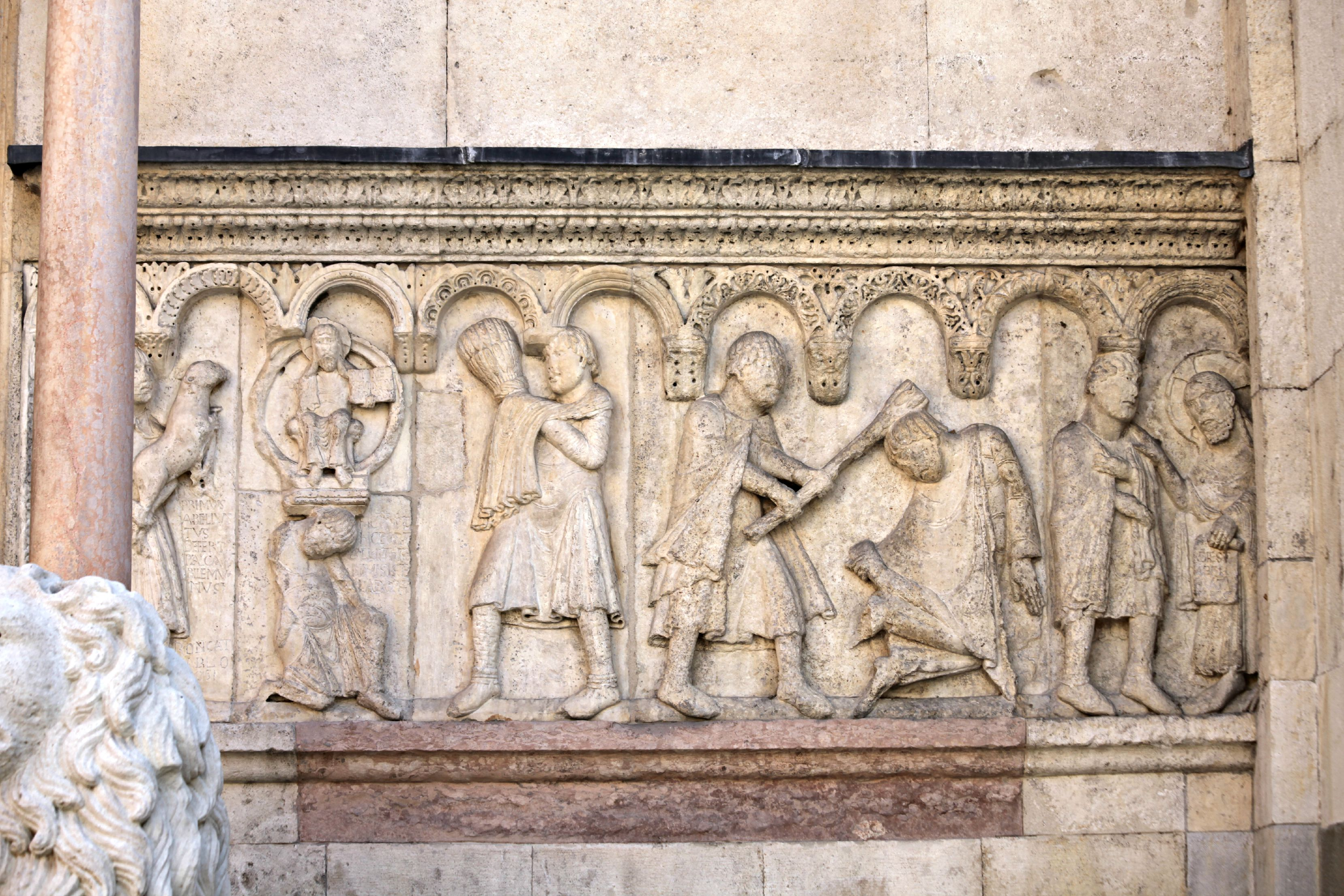 Duomo (solo esterni) This is a photo of a monument which is part of cultural heritage of Italy.